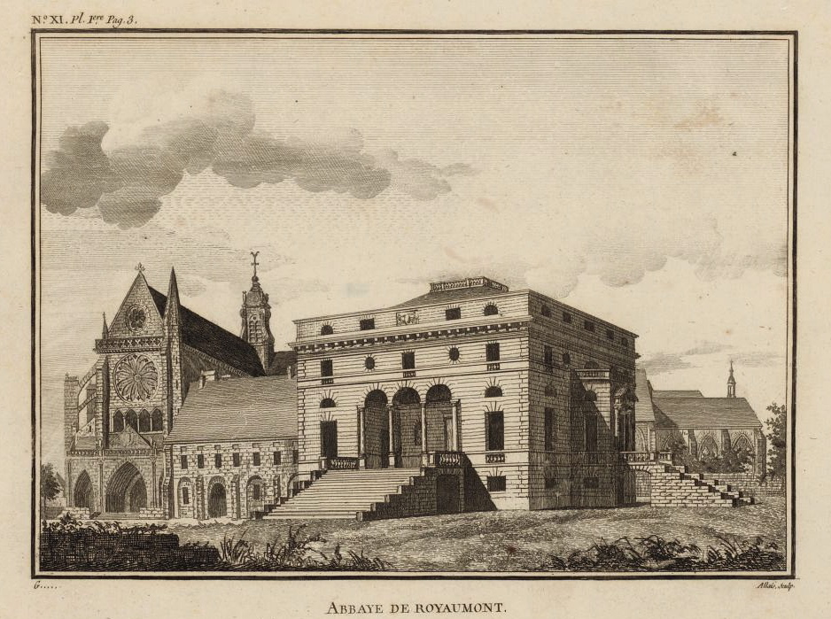 Vue de l’église et du palais abbatial de Royaumont, par Louis-Jean Allais (1762-1833)